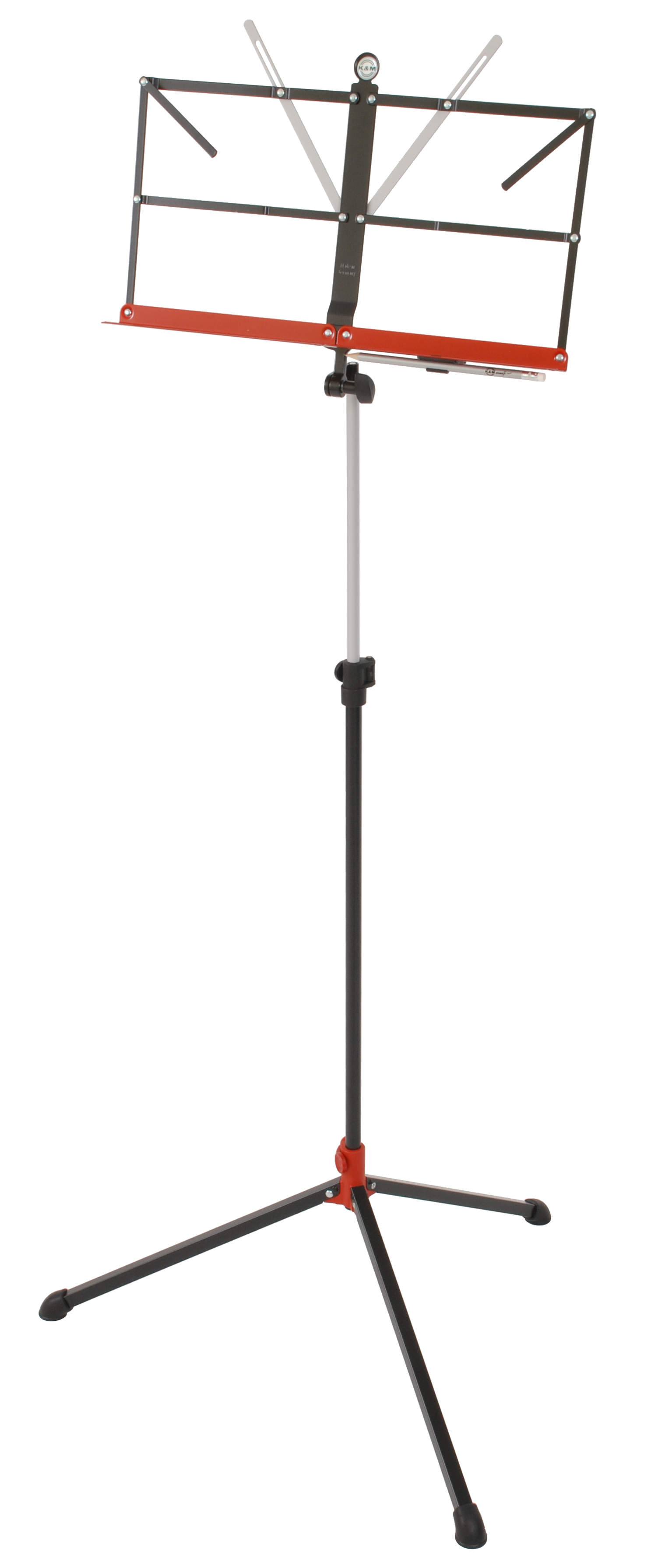 Pulpit do nut, składany, trójkolorowy 11100 Butterfly firmy K&M